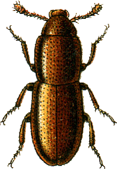 This file has been extracted from another file: Jacobs19.jpg